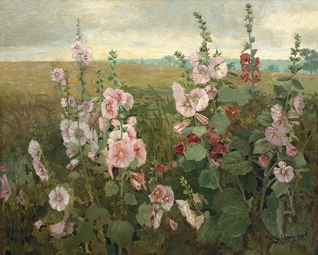 Hollyhocks